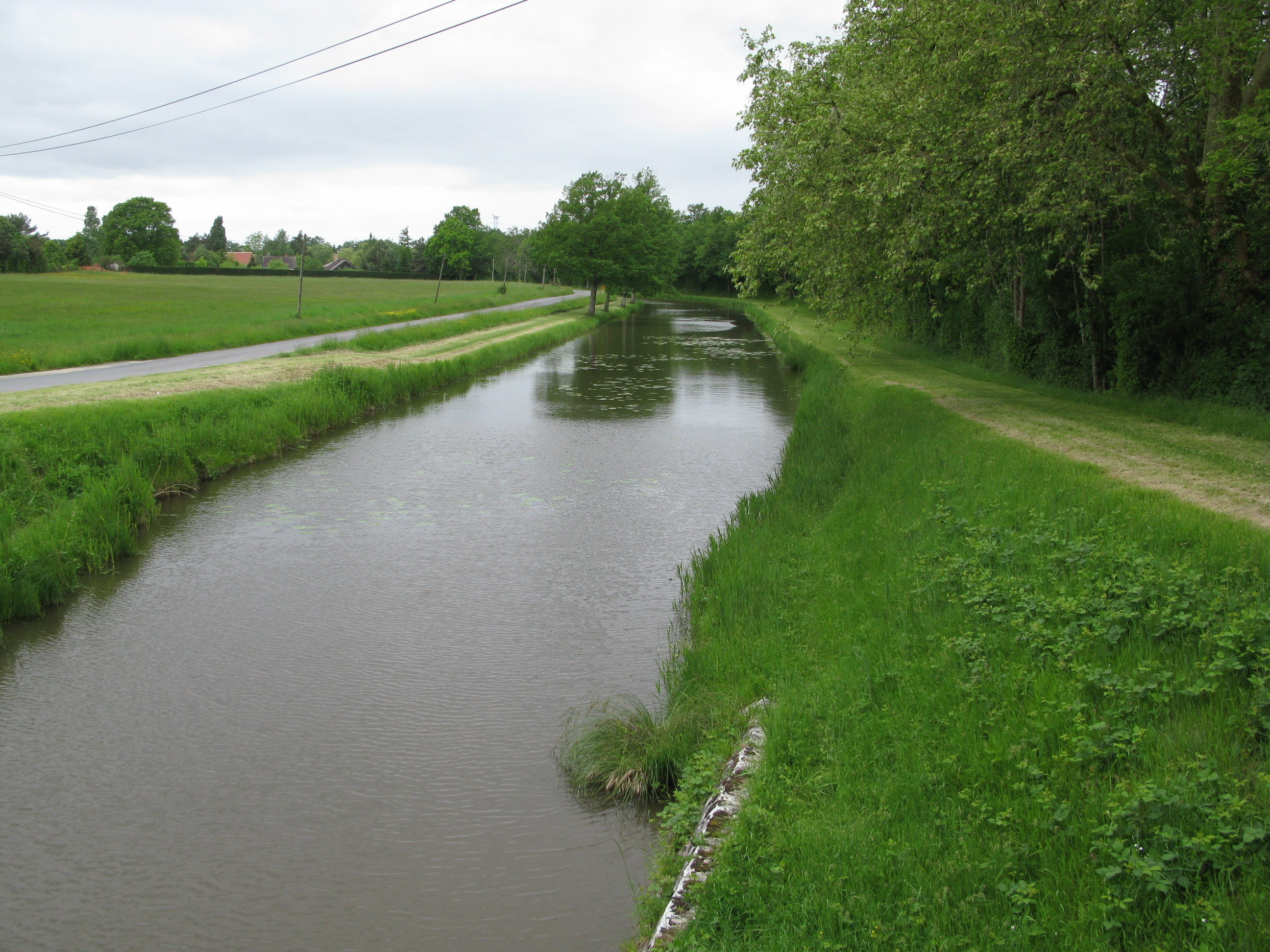 Le canal d'Orléans